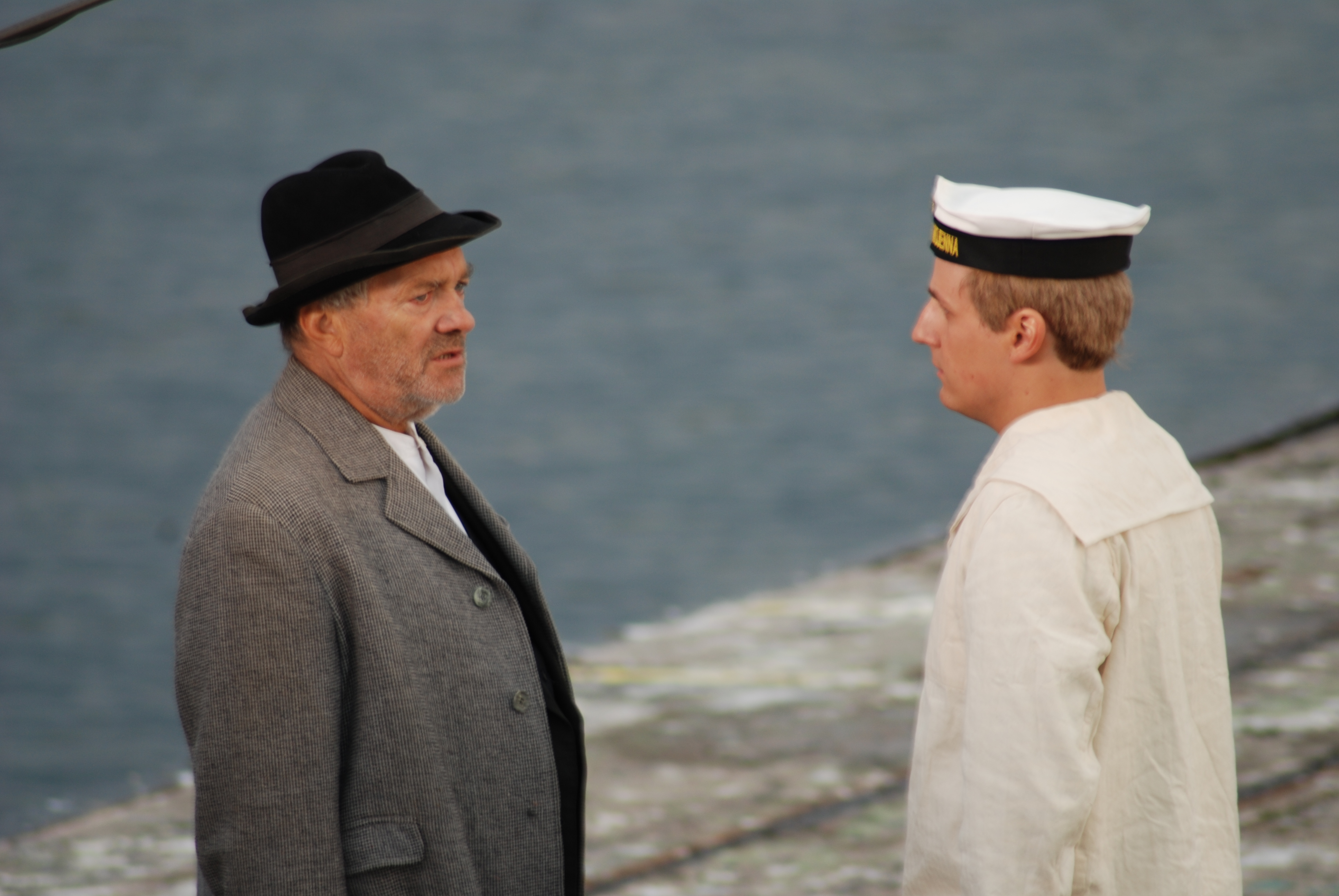 Zdzisław Wardejn jako Jazowiecki na planie filmu Miasto z morza.